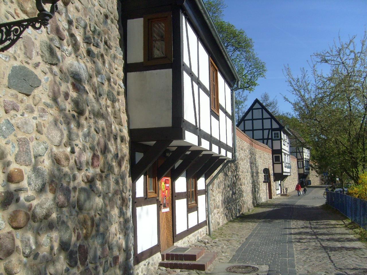 Wiekhäuser